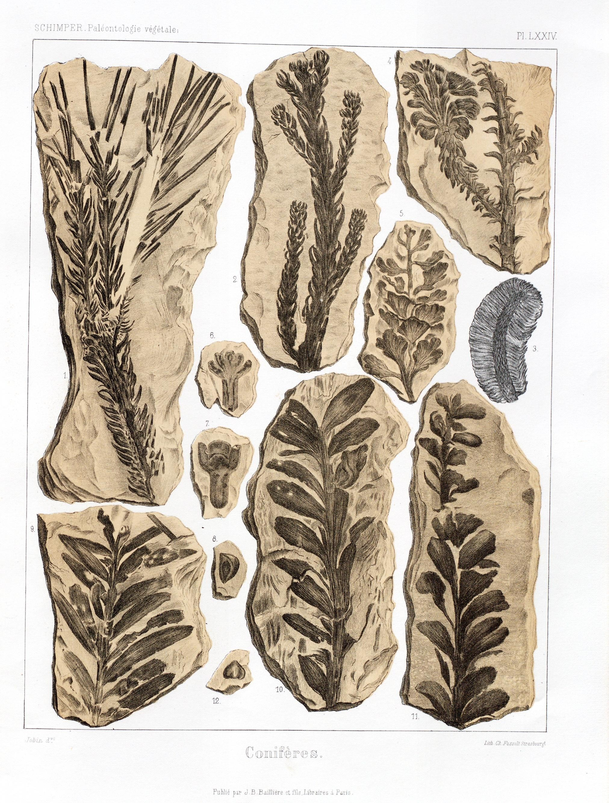 Jetai* Pl.LXXIV Comi ■